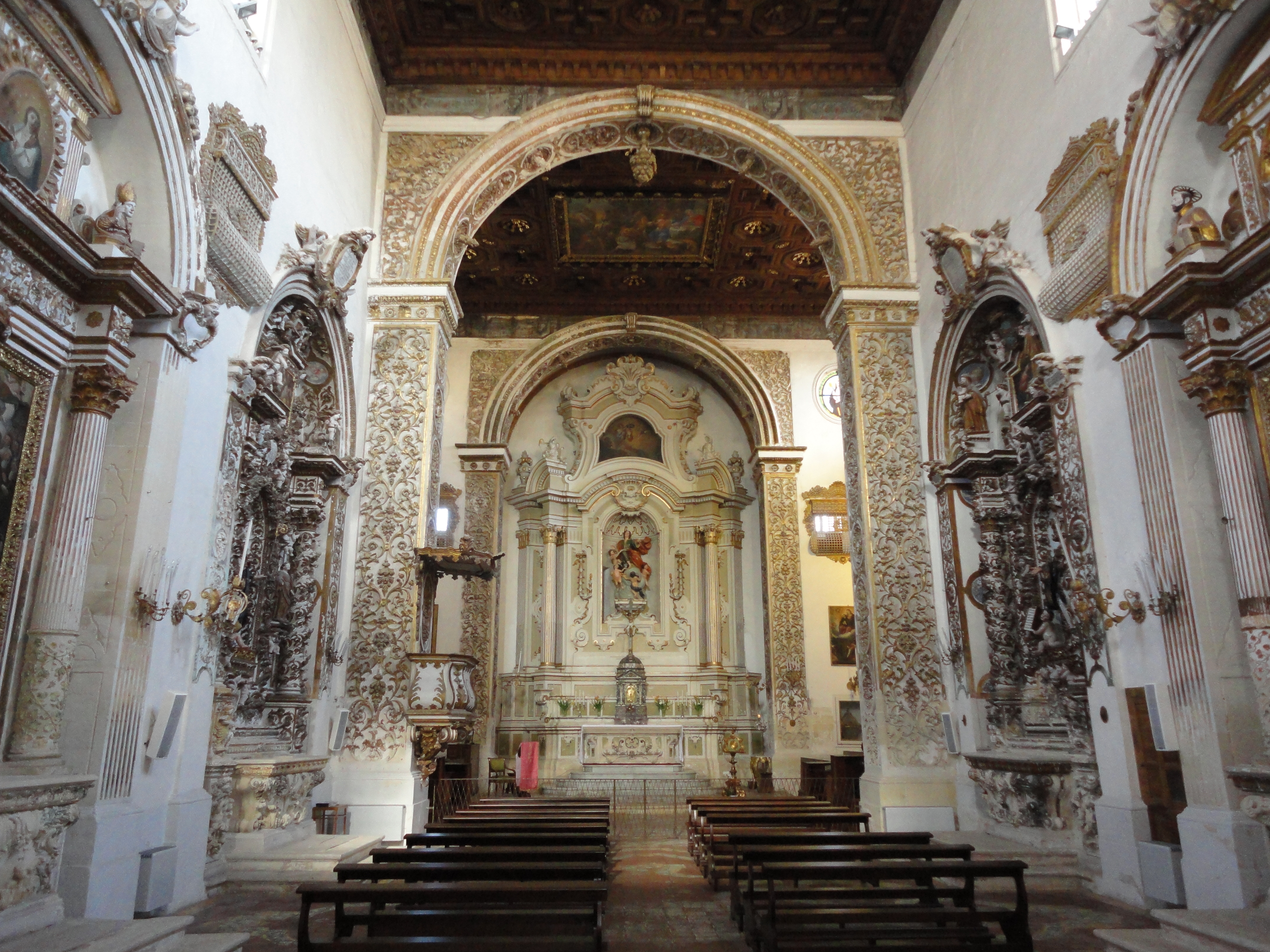 Interno San Giovanni Evangelista Lecce